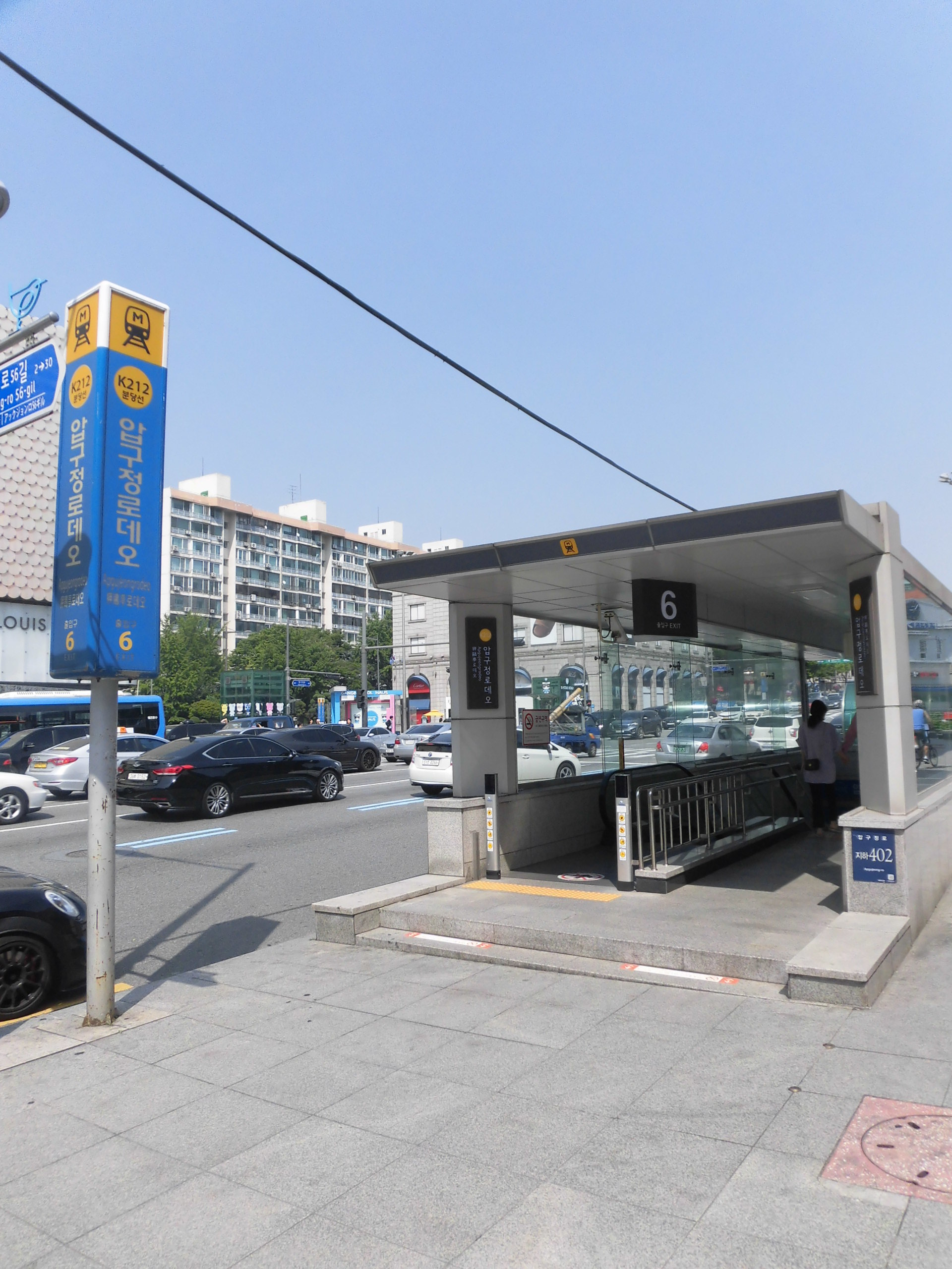 분당선 압구정로데오역 6번출구